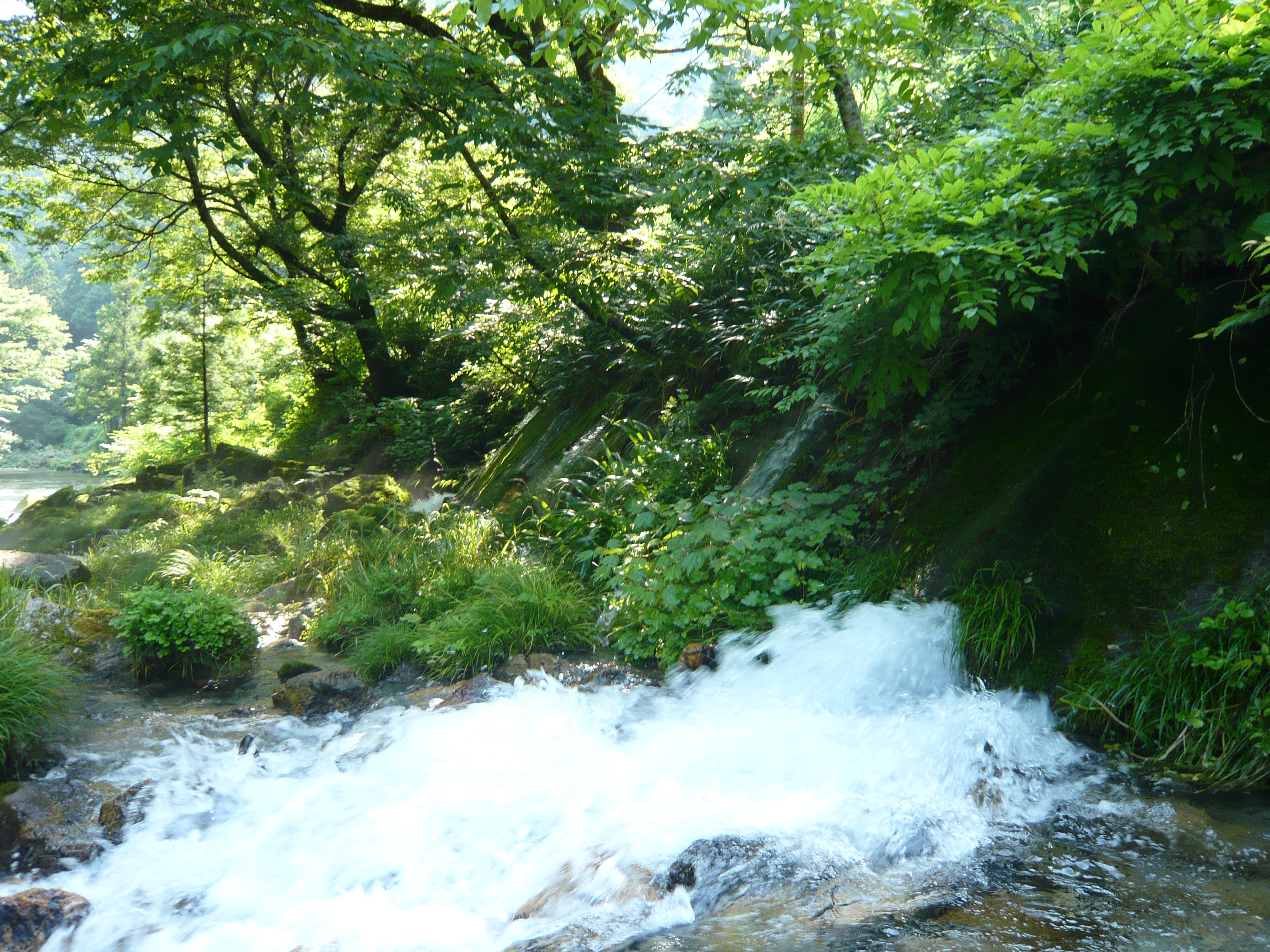 岐阜県山県市円原の伏流水。手前だけでなく、奥の水流もすべて湧水である。